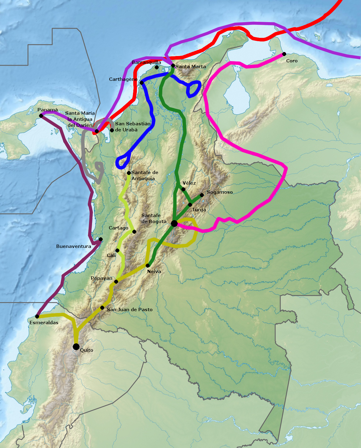 Trajet des conquistadors en Colombie Alonso de Ojeda (1499-1501) Vasco Núñez de Balboa (1513) Pedro Arias Dávila (1513-1519) Pascual de Andagoya, Diego de Almagro et Francisco Pizarro (1515-1529) Pedro de Heredia et ses lieutenants (1532-1538) Sebastián de Belalcázar (1533-1539) Lieutenants de Sebastián de Belalcázar (1533-1539) Gonzalo Jiménez de Quesada (1536-1538) Nicolás de Federmán (1537-1539)